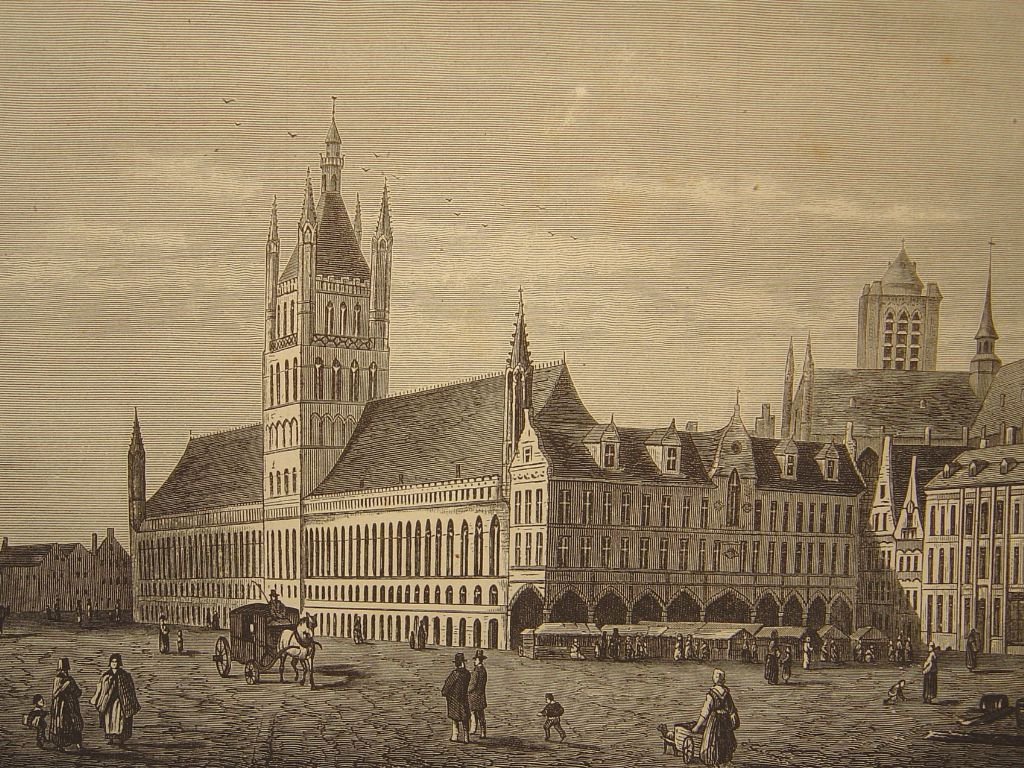 les Halles à Ieper par Ch. Trumper